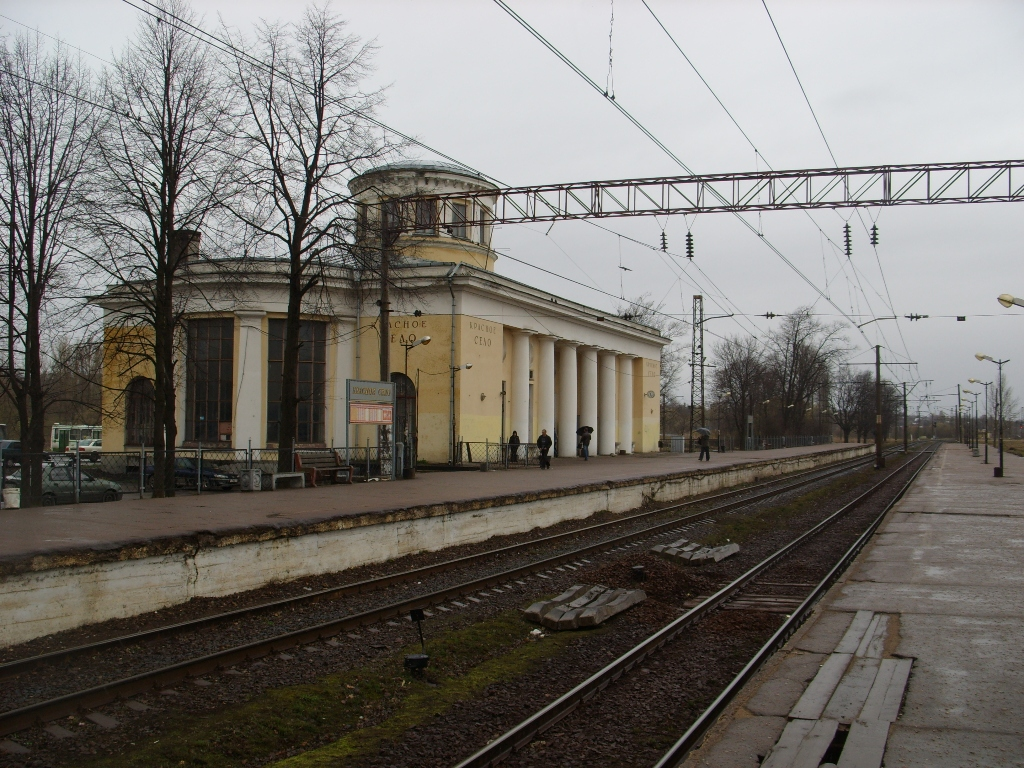 Ст. Красное Село, вид в сторону ст. Лигово